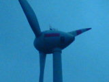 Gondel einer Enercon E-112 Windenergieanlage